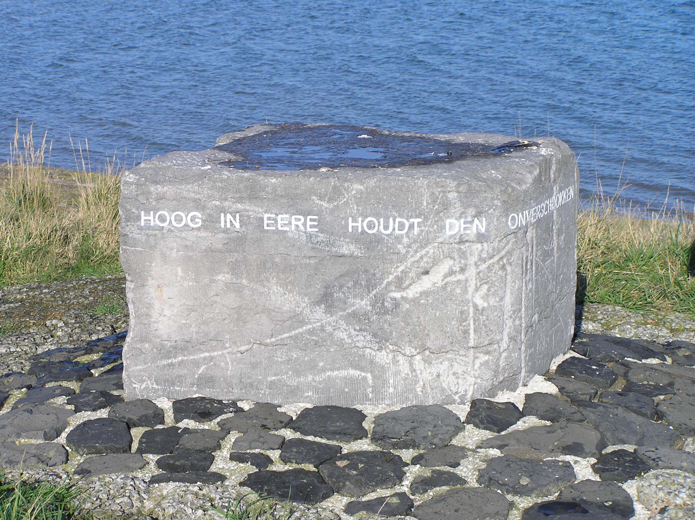 Monument voor Frans Naerebout, Oosterscheldedijk ten westen van het Goese Sas.